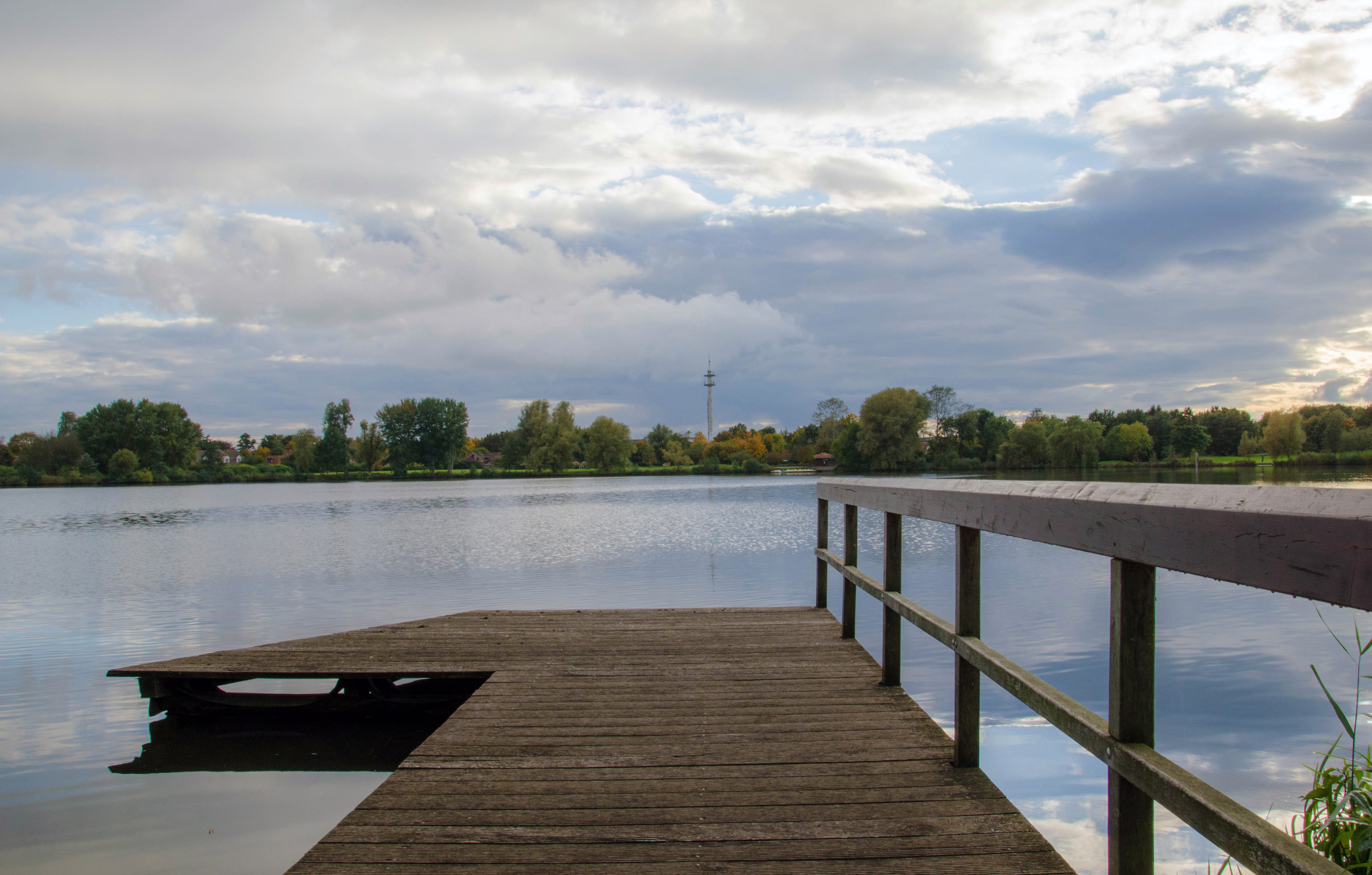 Dieses Bild zeigt den Vörder See in Richtung Süden von Nordsteg aus. "Vörder_See_Steg_Norden_cropped.jpg" ursprünglich "DSC_1862_bearbeitet-1.jpg".